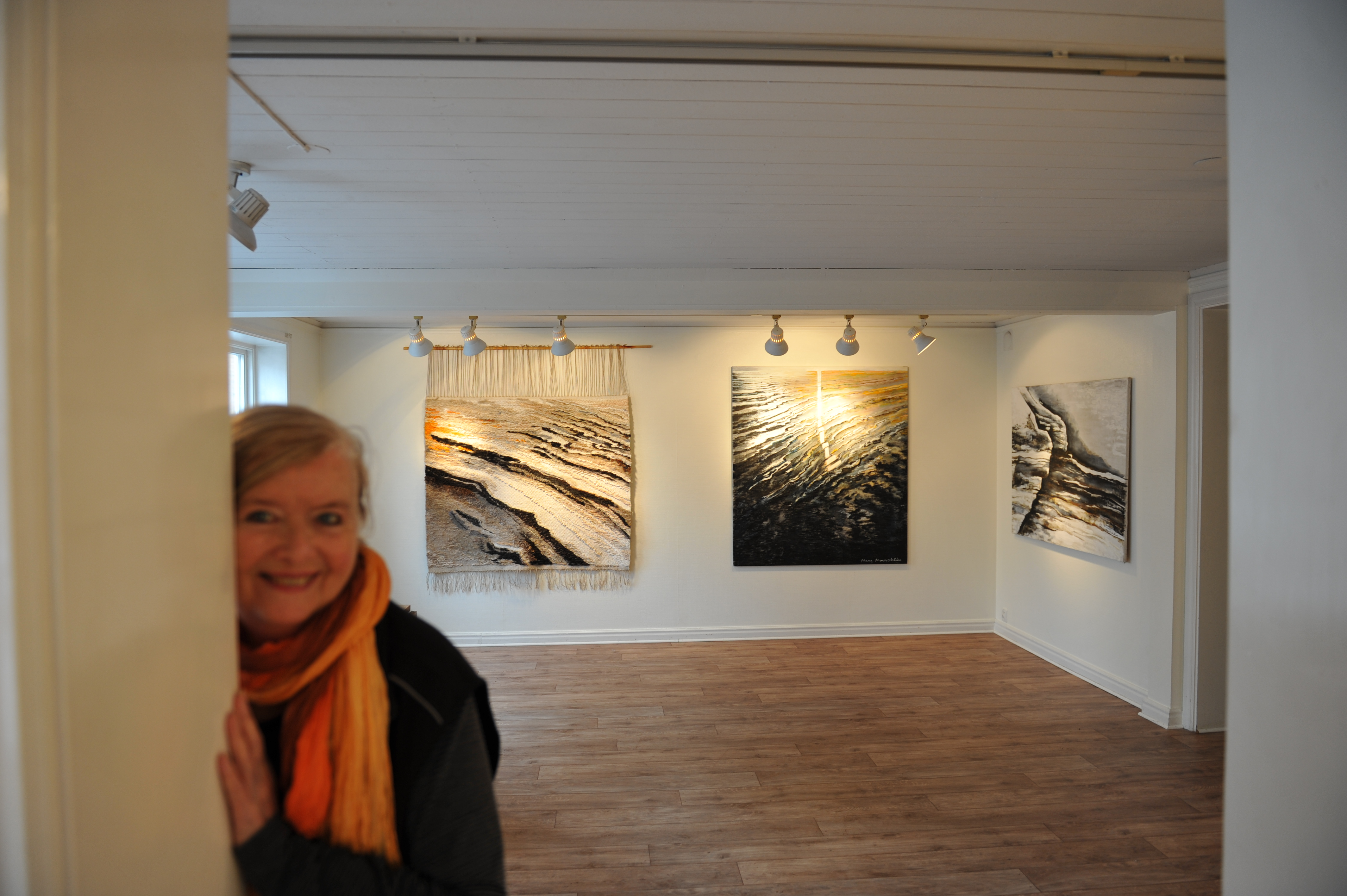 Mary Moeschlin i Konstnärsgården Jönköping 2010